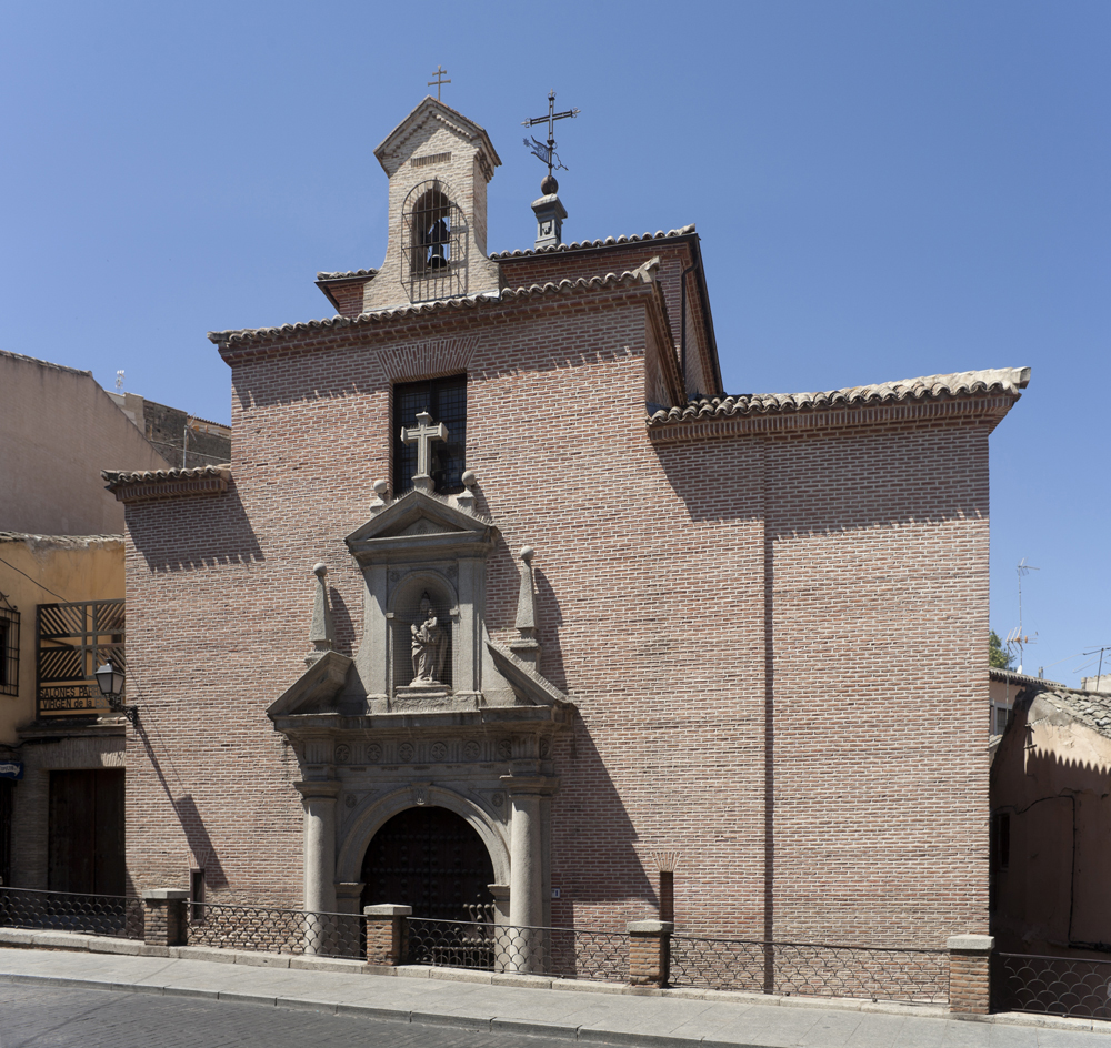 unidentified Cultural Heritage Spain